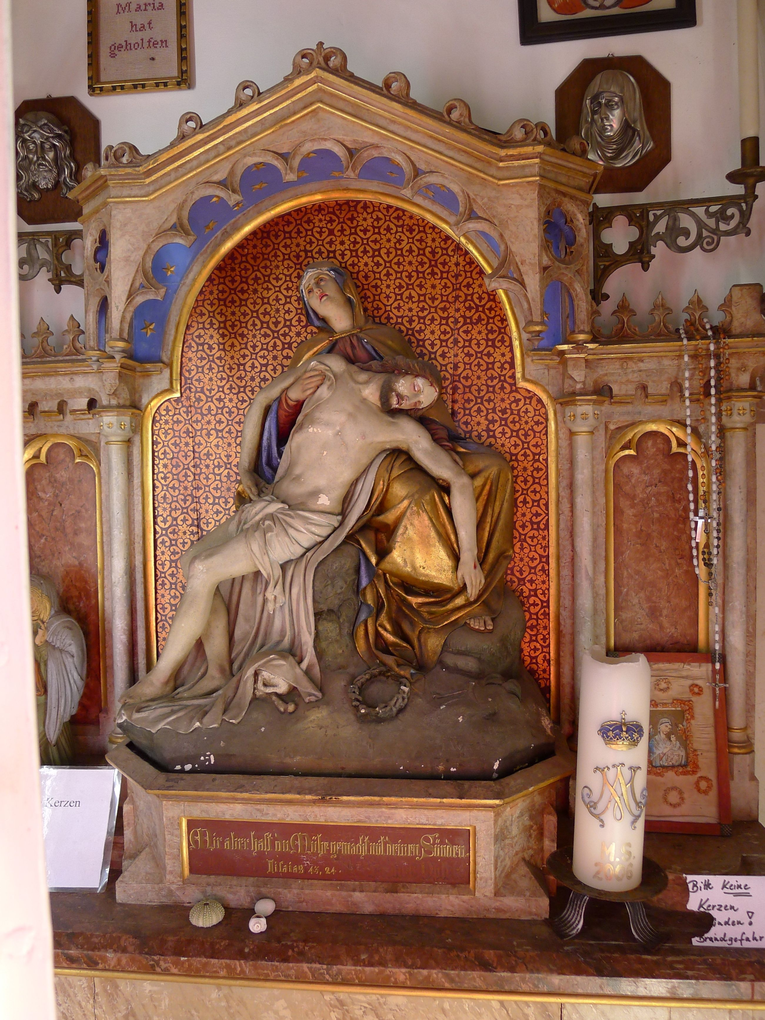 Pietà auf dem Altar der Riederstein-Kapelle , Nähe Tegernsee, Bayern